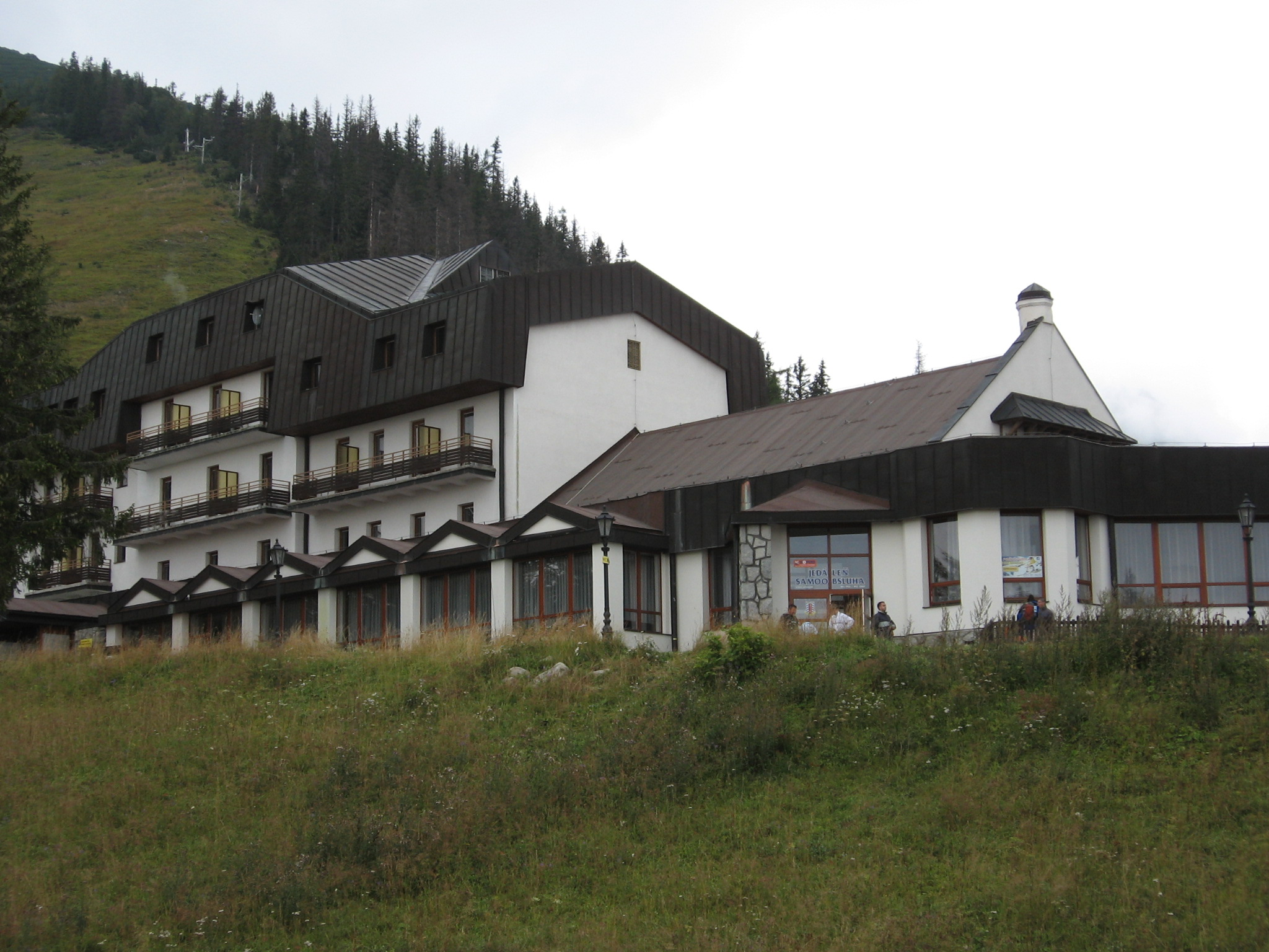 horský hotel Hrebienok